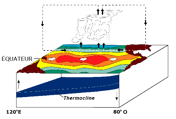 Circulation perturbée par le phénomène de El Nino: Les alizés faiblissent ce qui permet à l'eau chaude de la partie Ouest, qui était retenue par ceux-ci, de dévaller la pente vers l'Est. Répartition de la température de surface de l'eau qui permet à la ciculation de Walker de se produire plus à l'Est ce qui perturbe le patron météorologique normal.